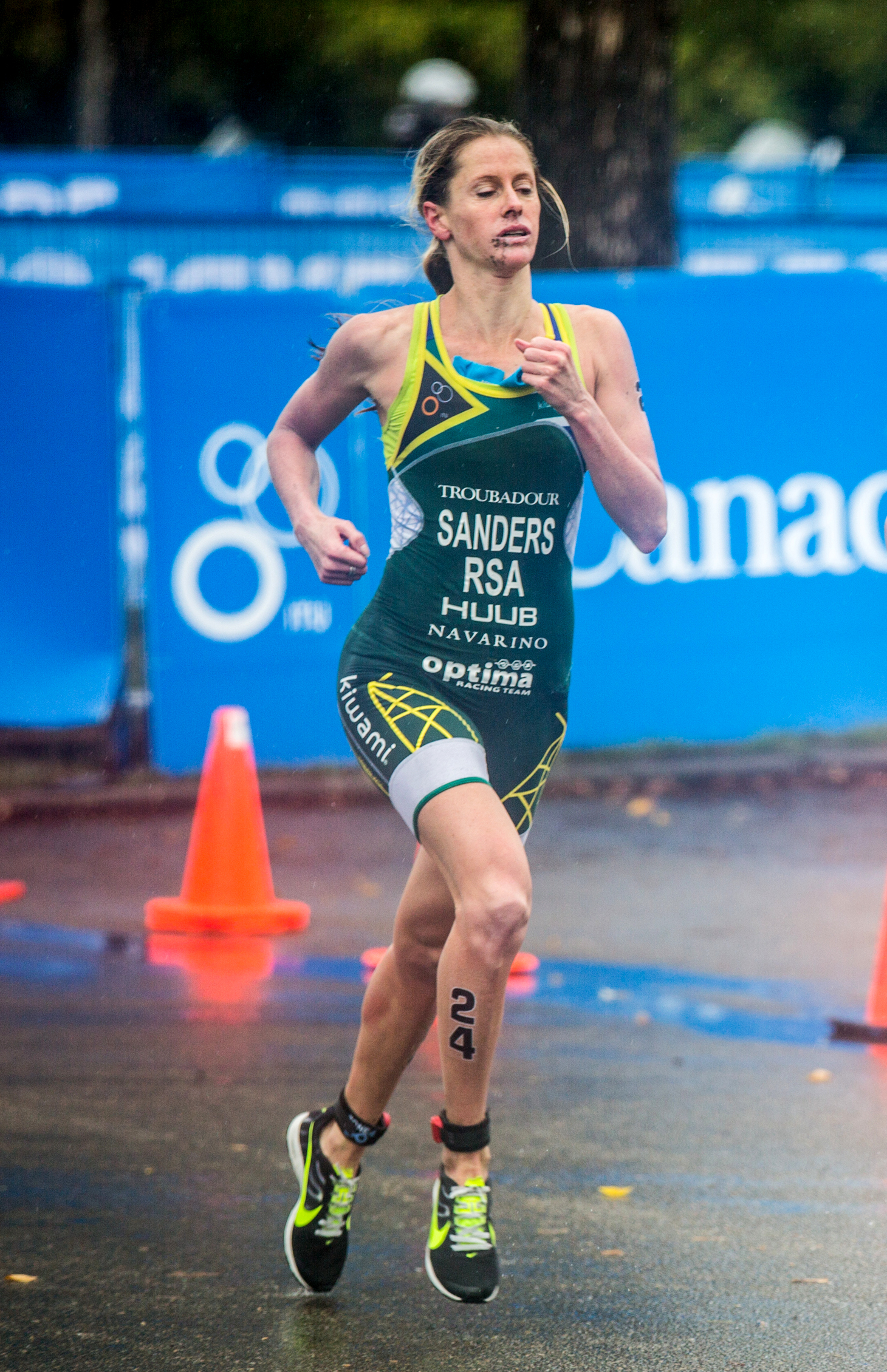 Gillian Sanders WTS 2015 Edmonton